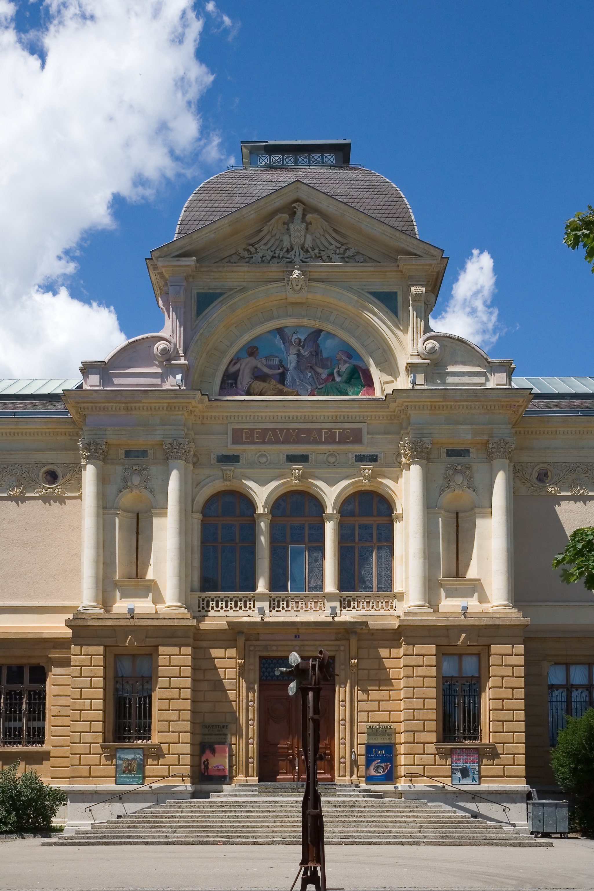 Hauptportal und Mittelrisalit des Kunstmuseums Neuenburg, Schweiz